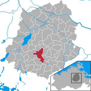 Ivenack, Landkreis Demmin, Mecklenburg-Vorpommern